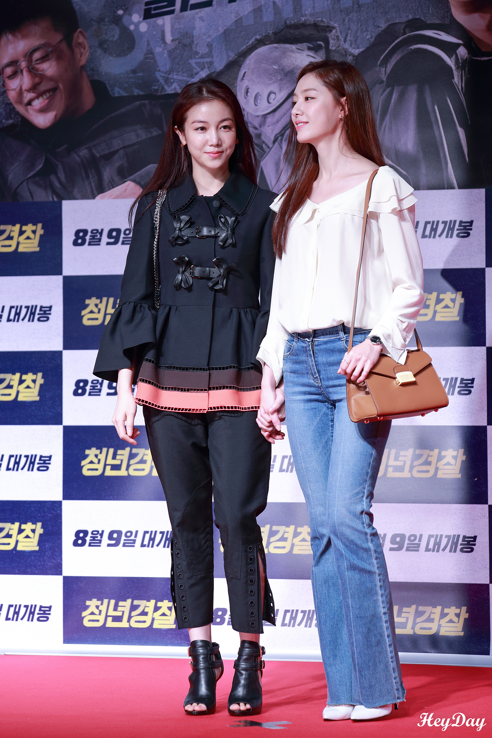 170807 청년경찰 VIP 시사회